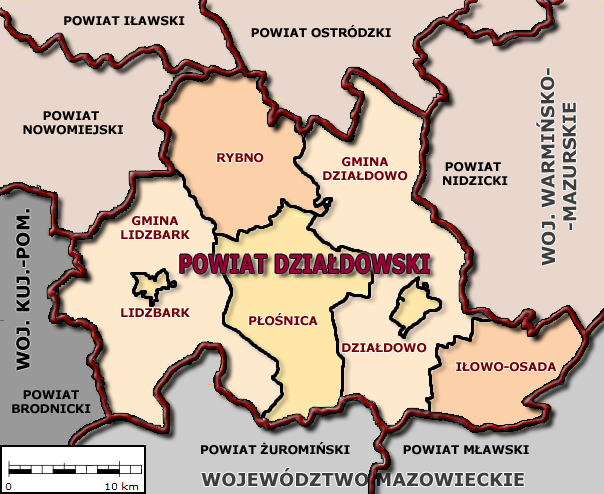 Mapa powiatu działdowskiego z podziałem na gminy